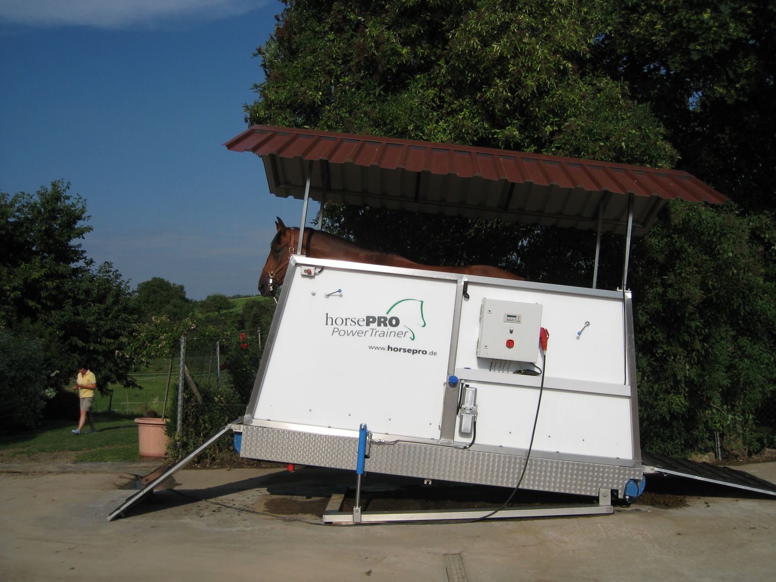 Laufband für Pferde bergauf Training